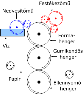 Offset nyomtatás.